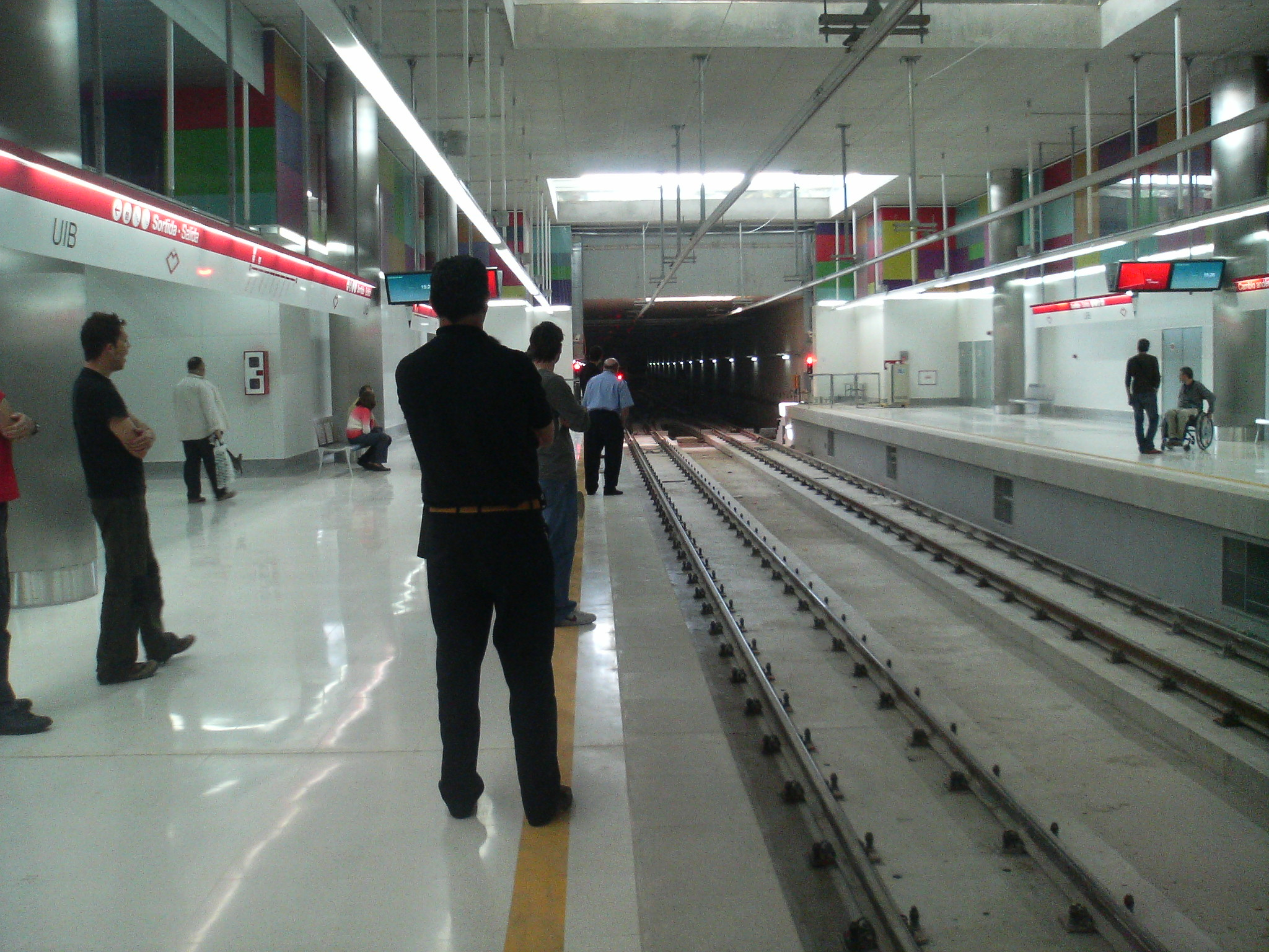 Estación de metro de la UIB